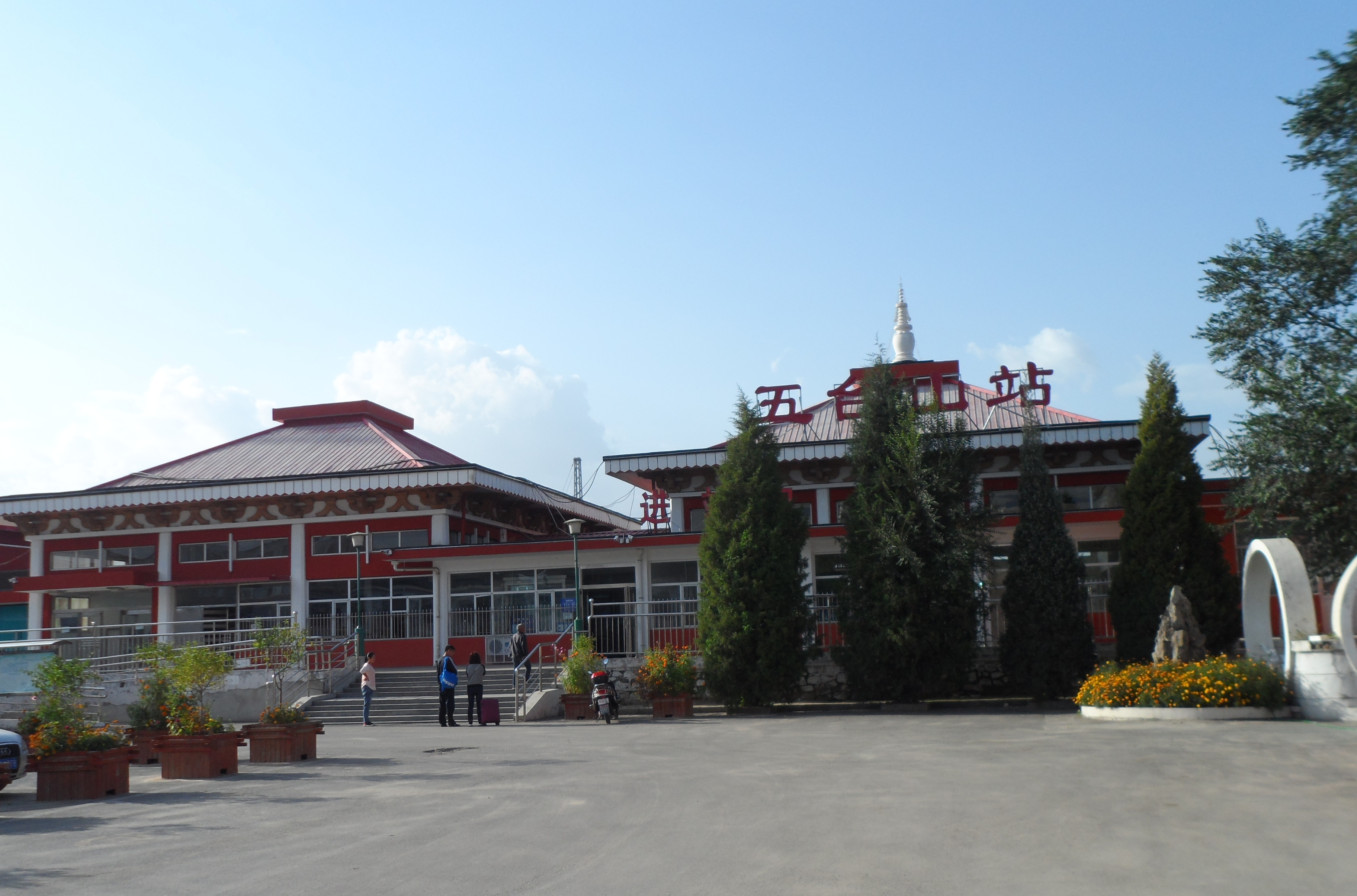 山西五台县火车站